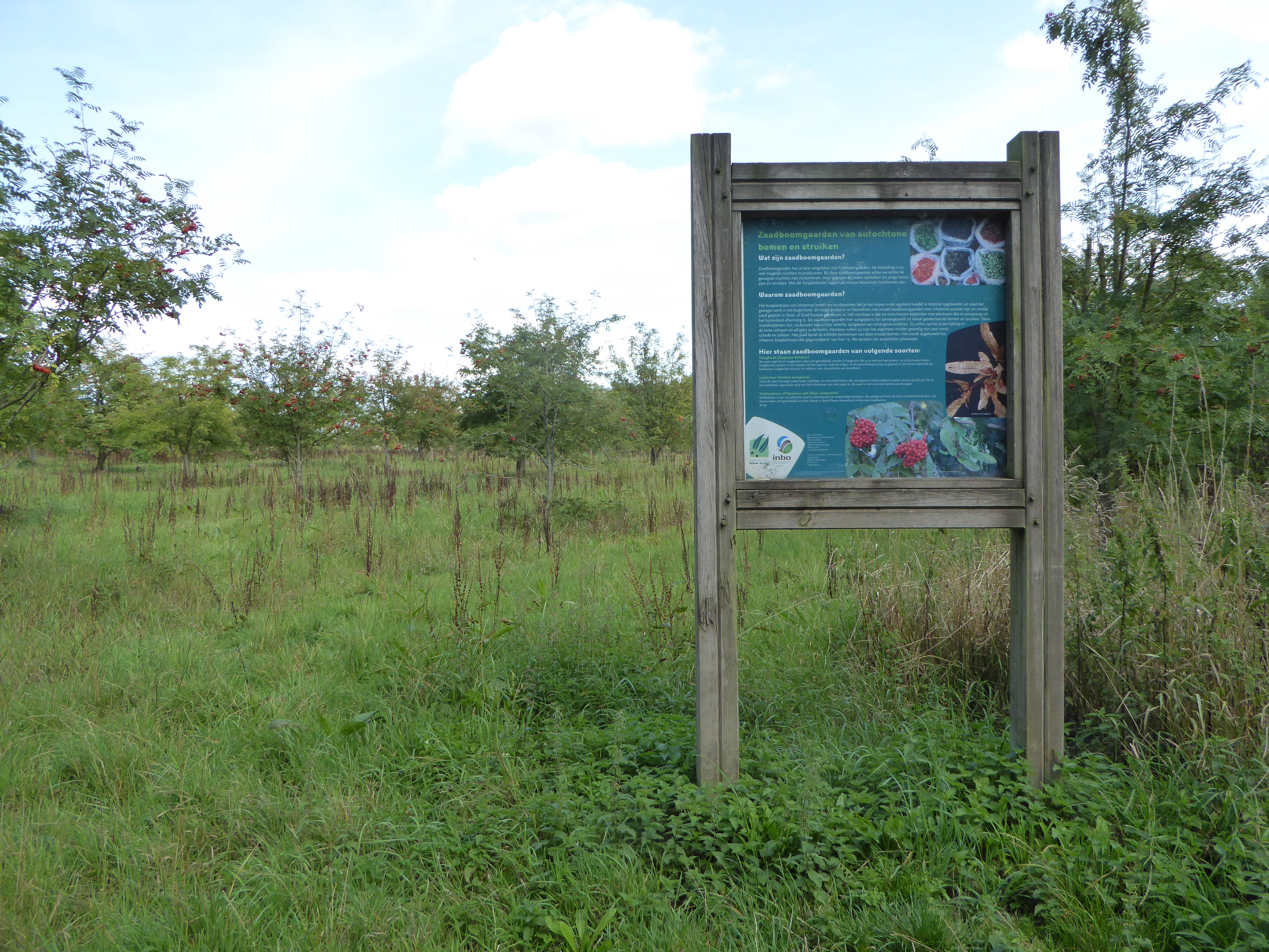 Réserve naturelle Het Eeuwenhout - Dranouter Dranouter' , Heuvelland, West Flanders, Belgium